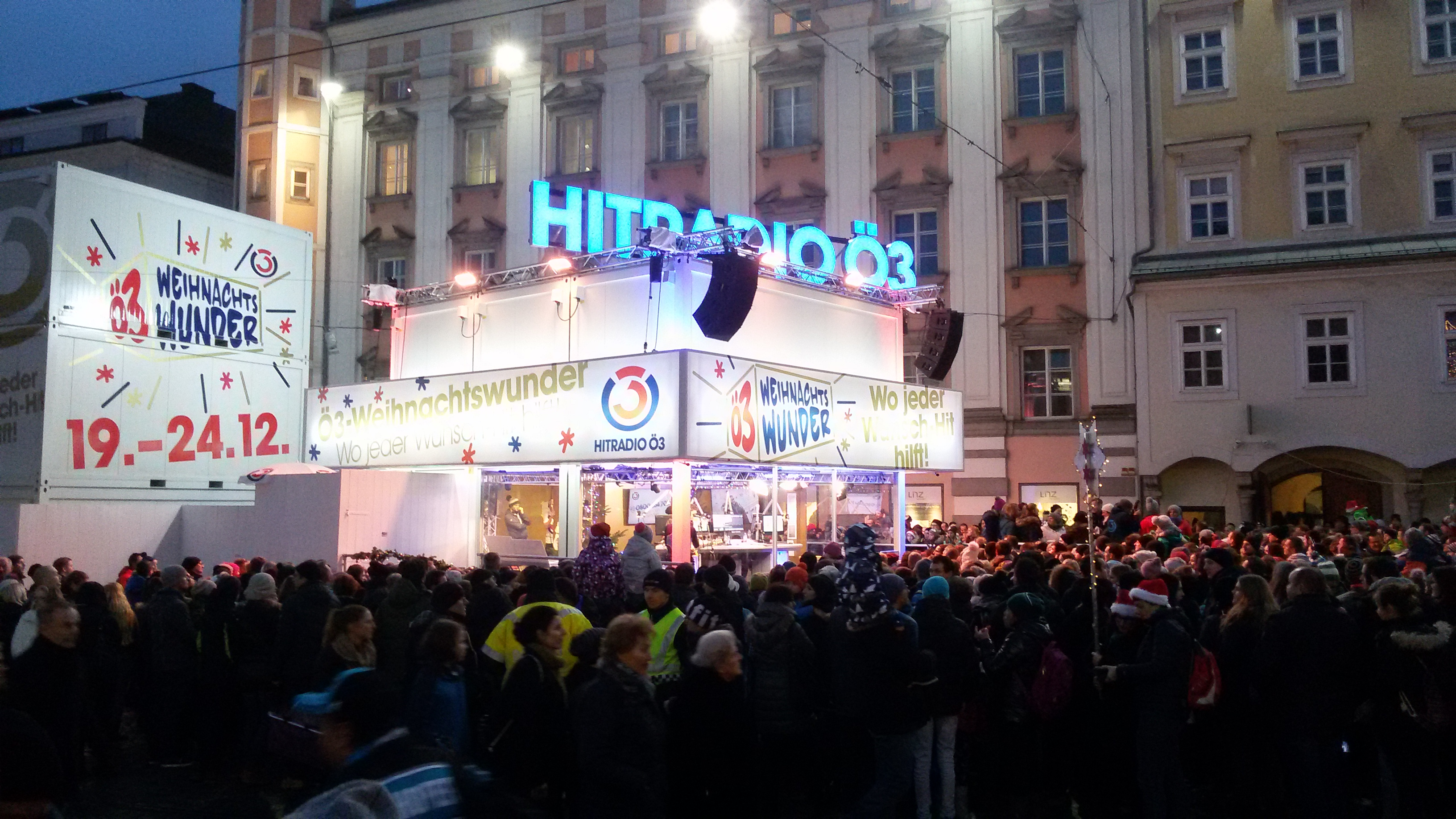 Aufnahme des Containers/ der Wunschhütte